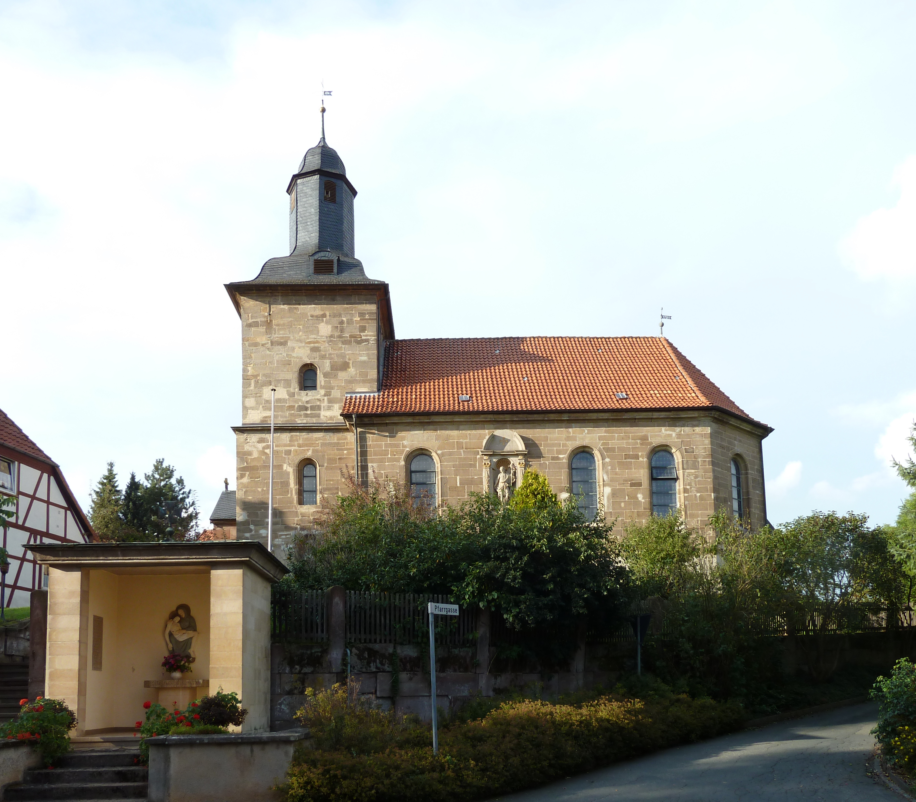 Katholische Kirche St. Johannes Baptist in Immingerode, Stadt Duderstadt, Niedersachsen. Erbaut 1717–21